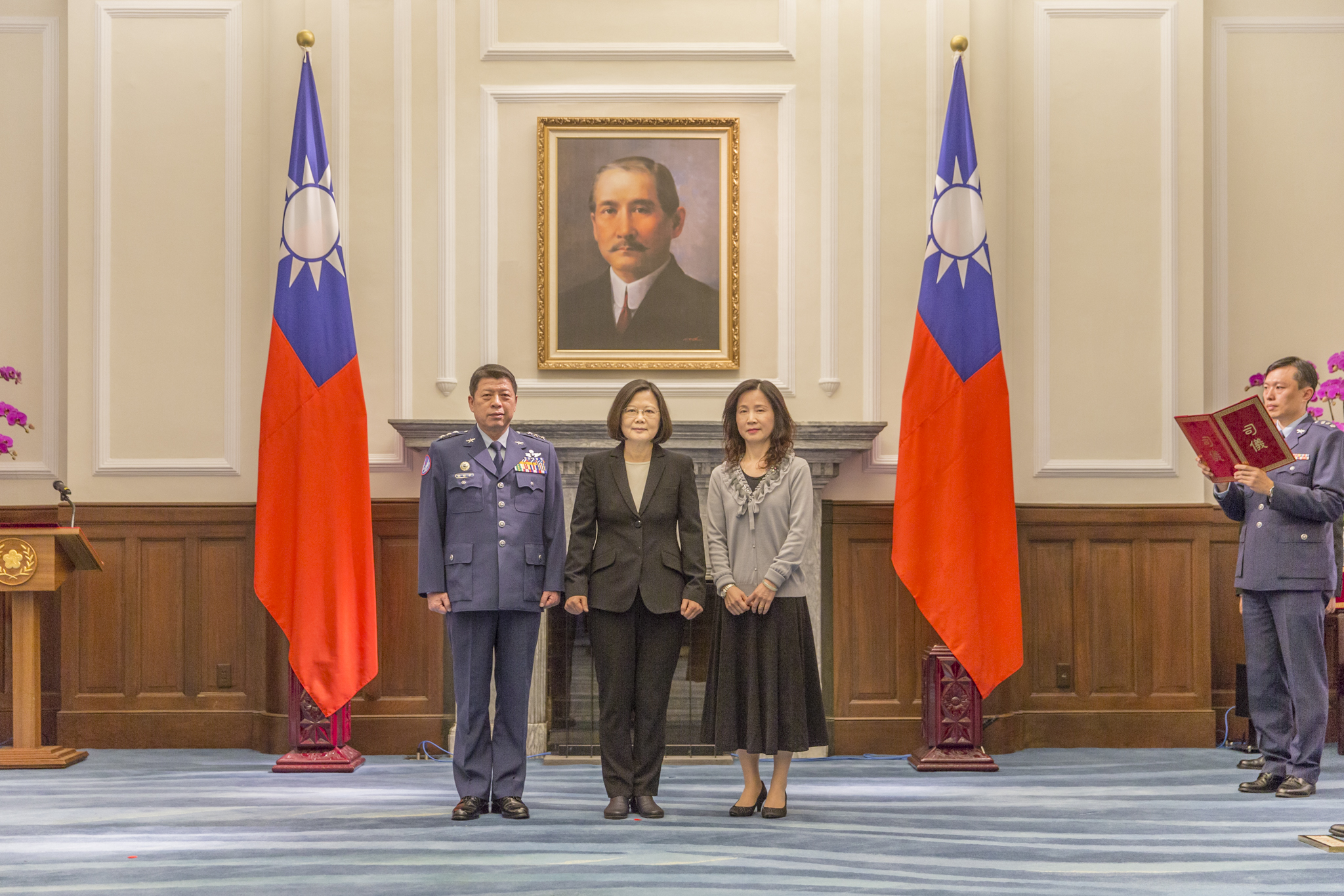 03.01 總統主持「國軍重要高階幹部晉任布達授階典禮：空軍司令張哲平」，與張將軍伉儷合影